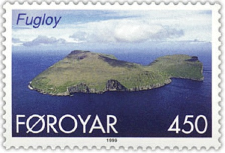 Die Insel Fugloy der Färöer